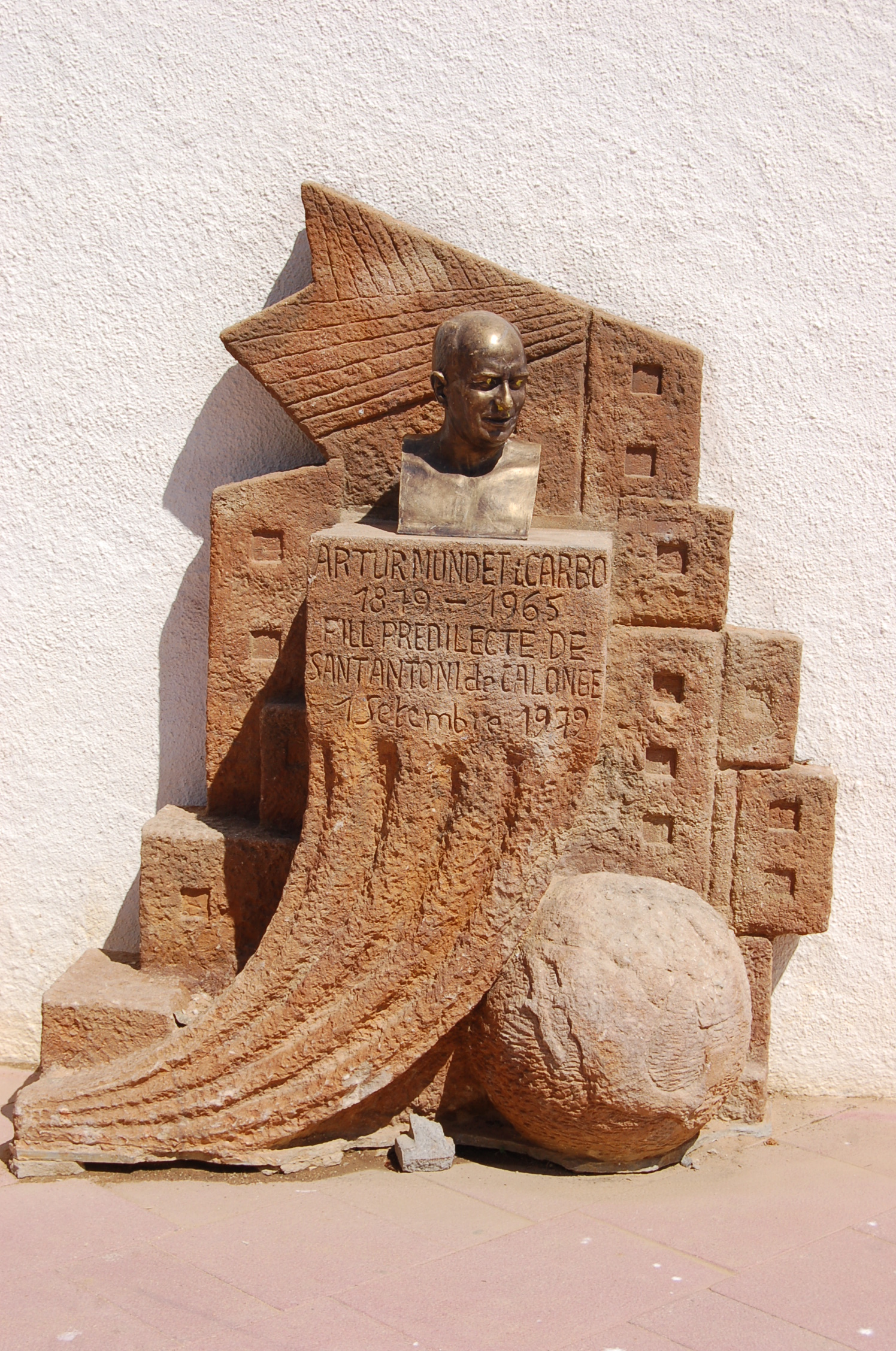 Monument a Artur Mundet Carbó a la Plaça Llibertat de Sant Antoni de Calonge